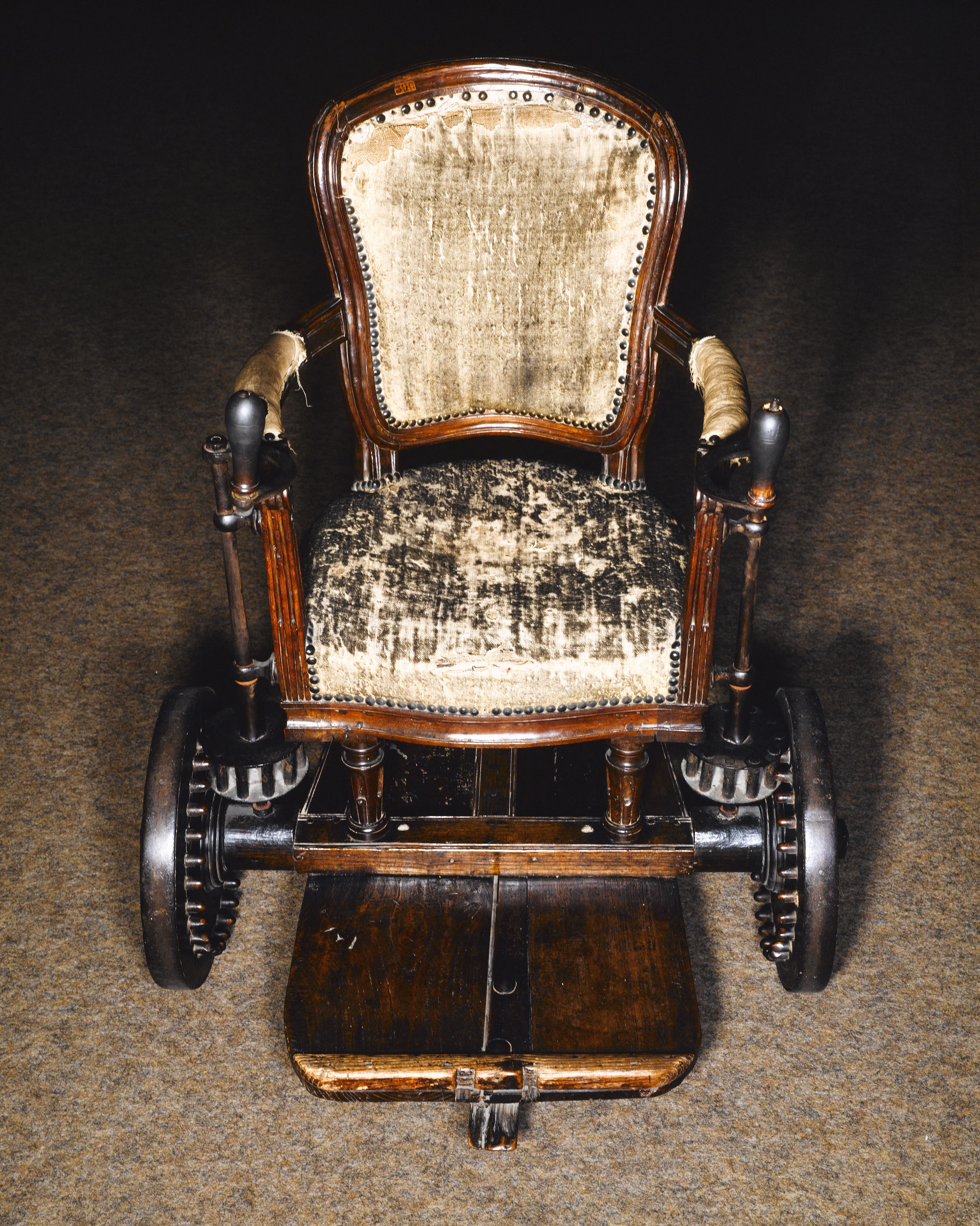 Fauteuil roulant de Georges Couthon.